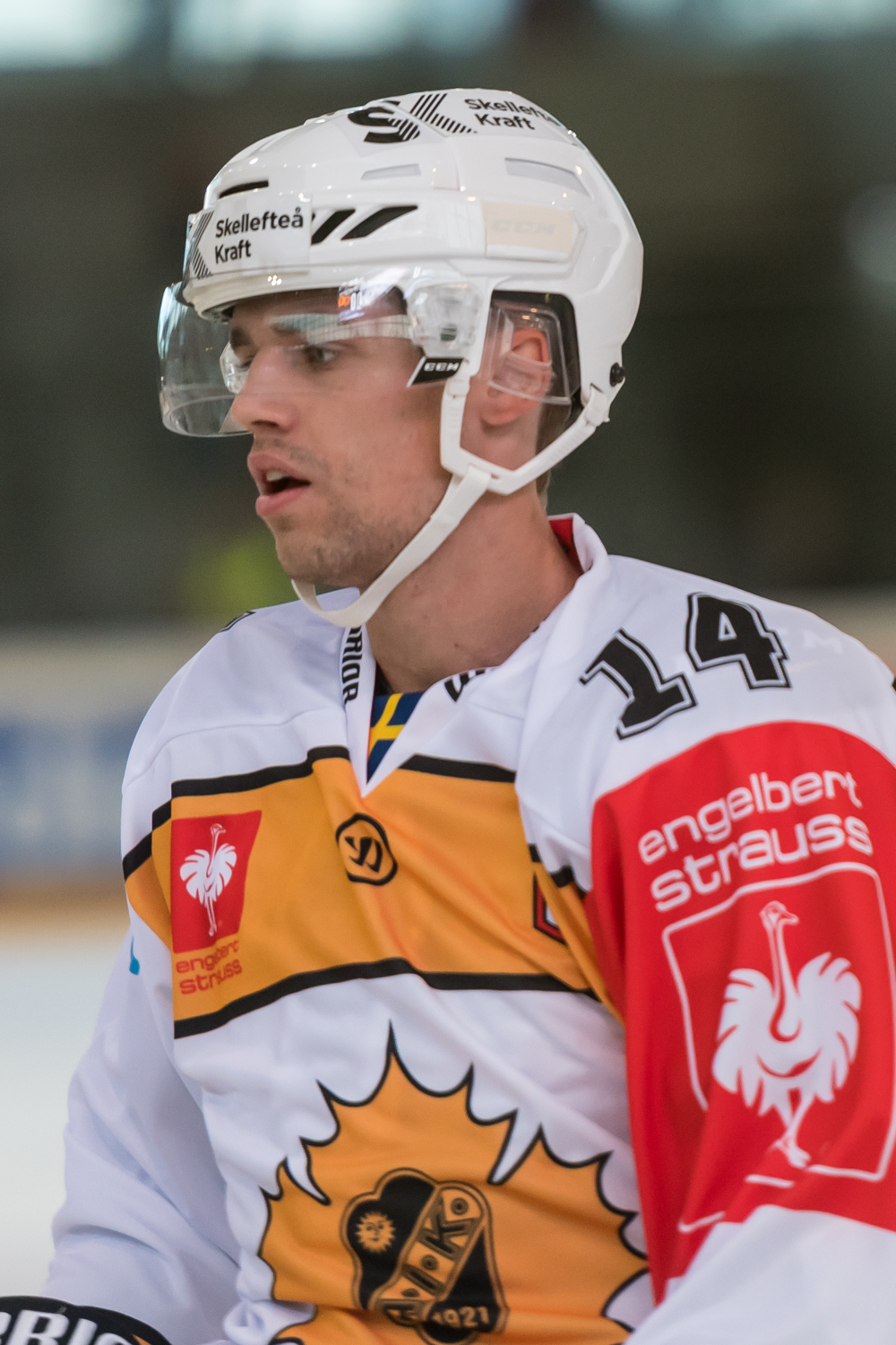 Champions Hockey League - Vienna Capitals vs Skelleftea AIK am 18.08.2016. Bild zeigt Emil Pettersson (Skelleftea AIK).